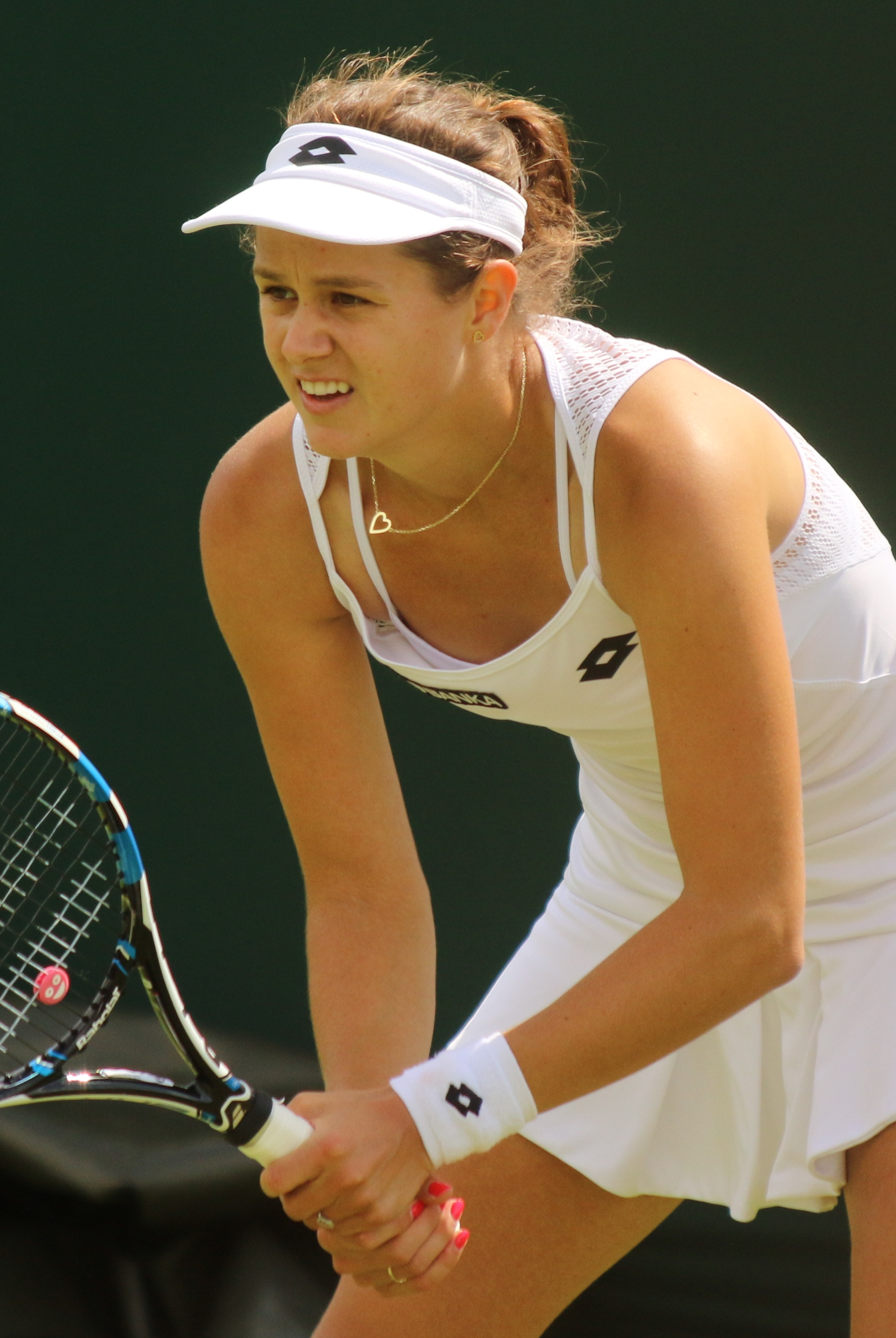 Cepelova WM16 (15)